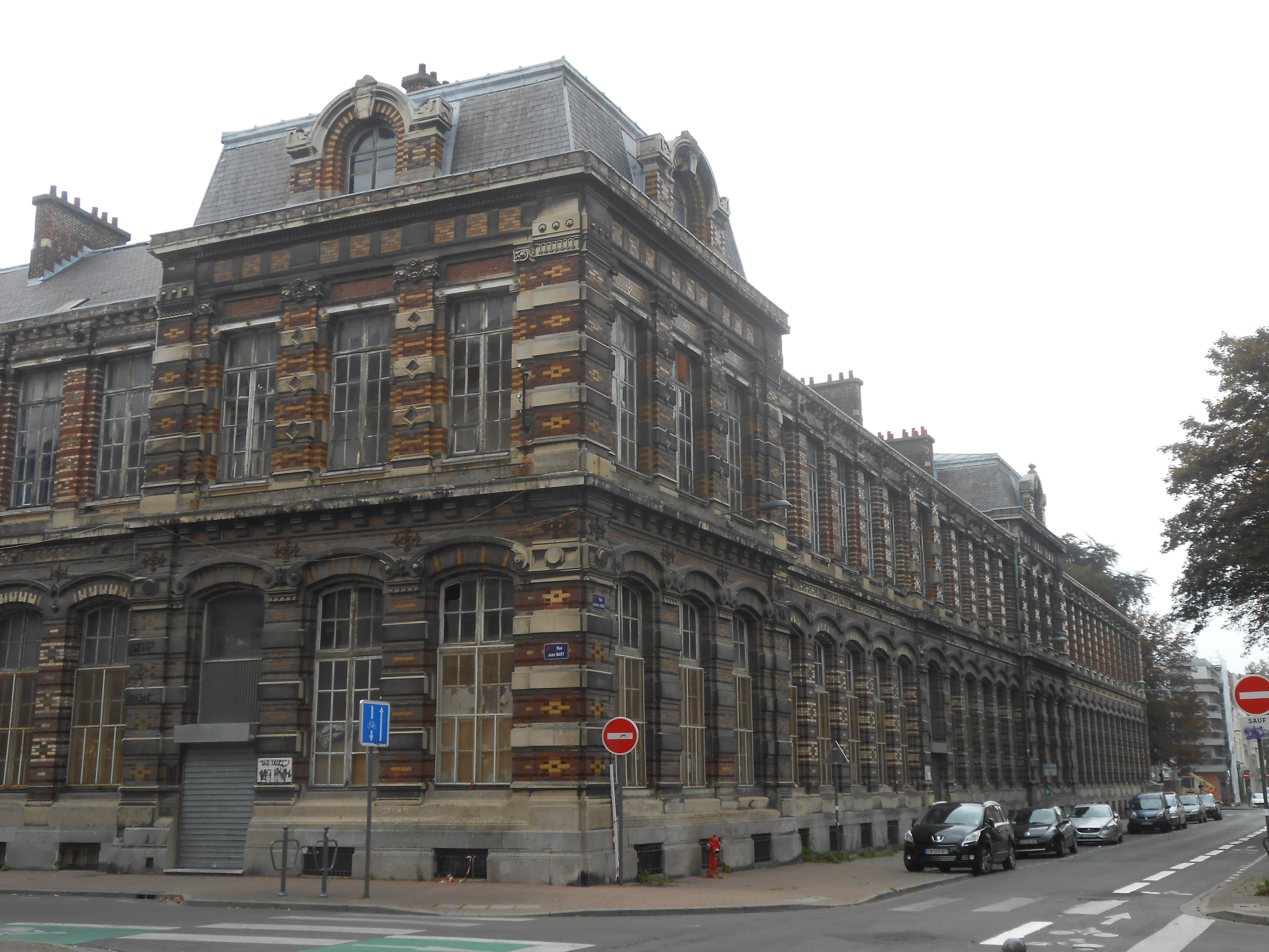 Université de Lille - Facultés de Lille, angle rue Jean Bart et rue Jeanne d'Arc, Lille, France